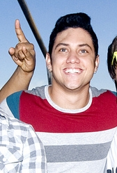 Rafael Barreto no Olodum no Carnaval de Salvador 2011.